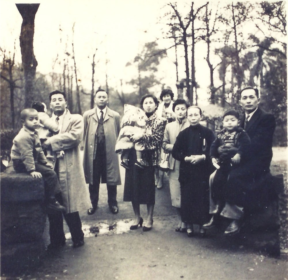 中文（台灣）: 兩人所抱者應有一人係次女蘇治芬(1953生)